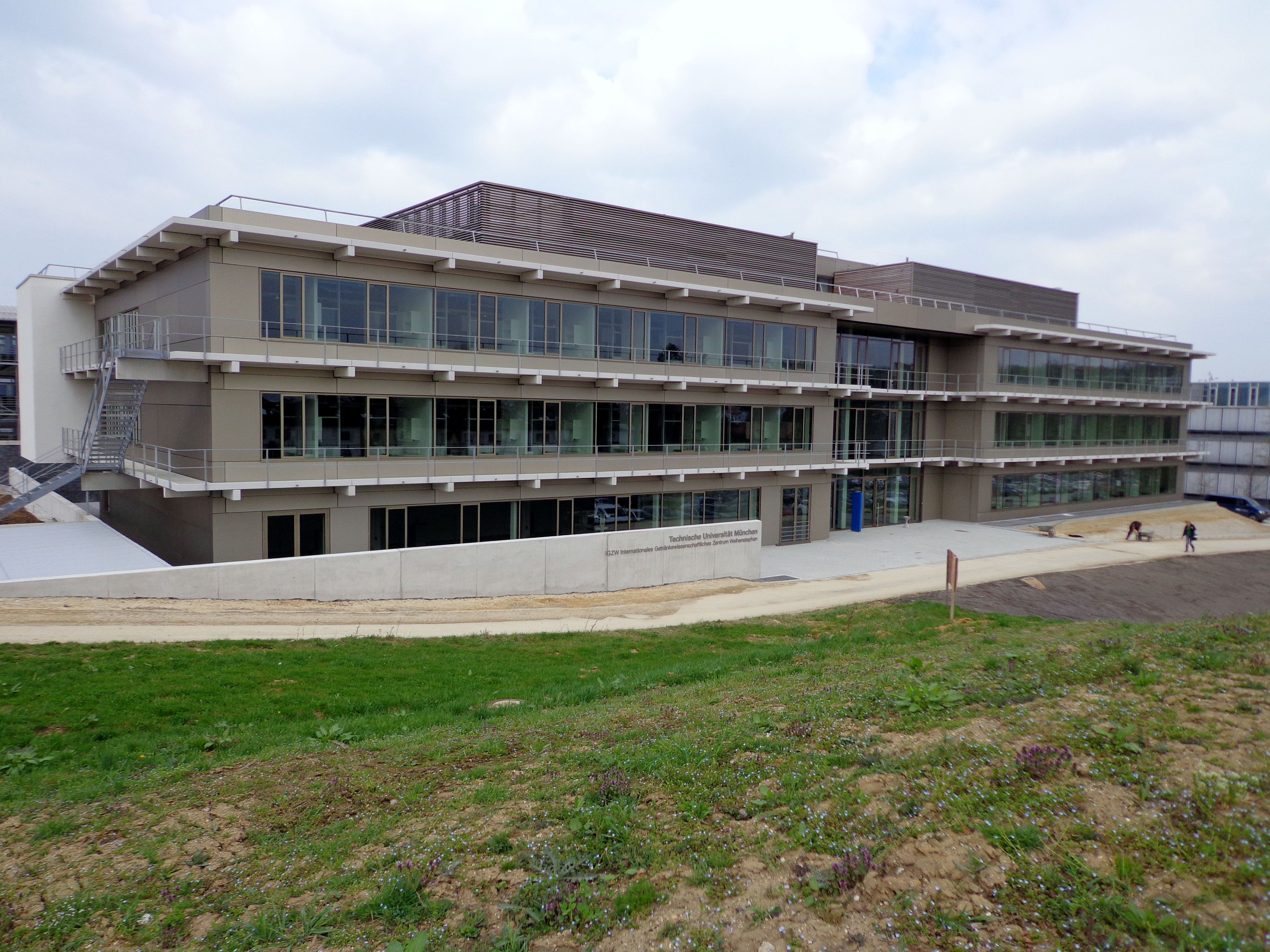 Das neue am 22.03.2013 eingeweihte Internationale Getränkewissenschaftliche Zentrum Weihenstephan (iGZW)